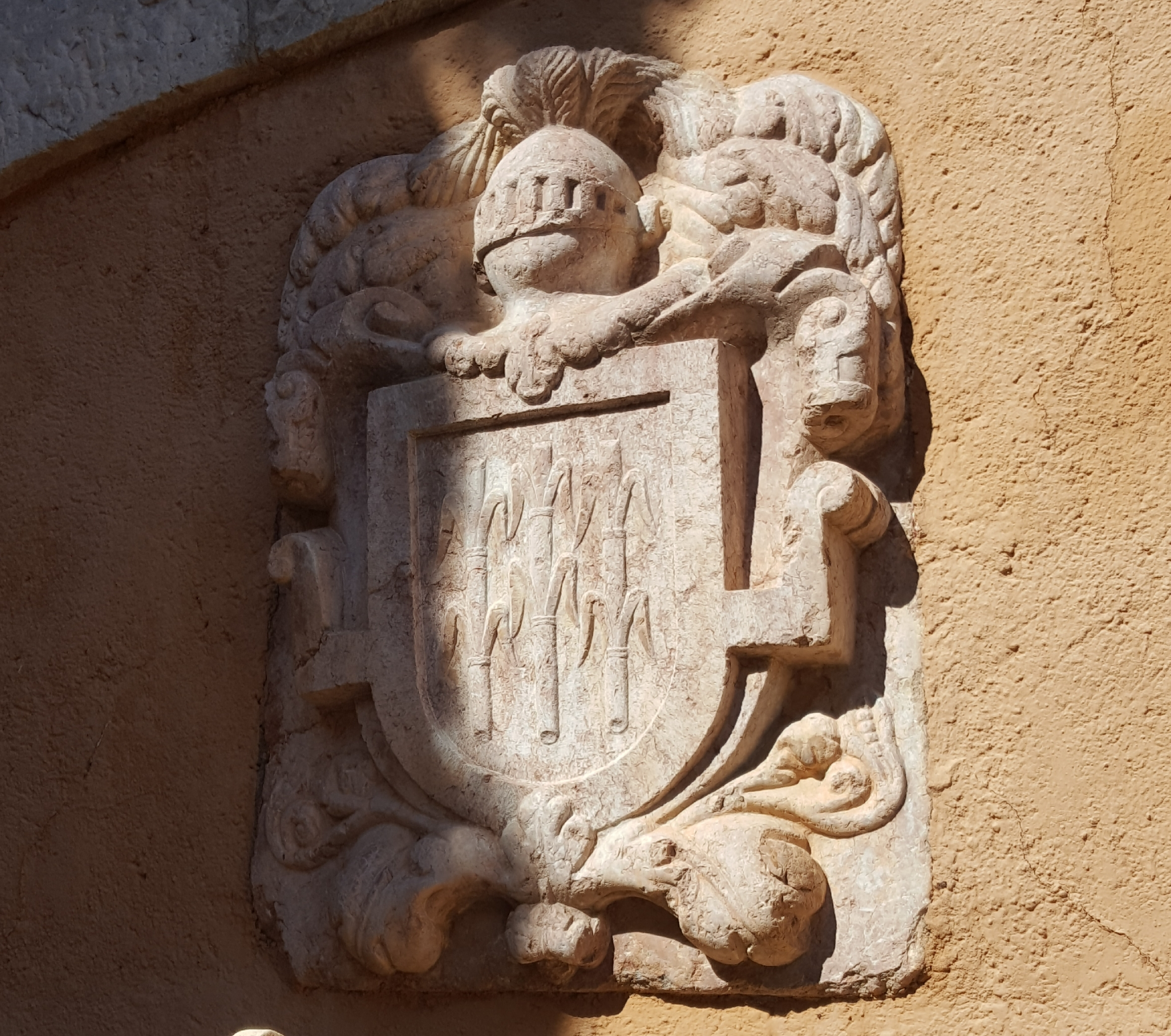 Escudo en piedra de la familia de los Cañaveral situado en el castillo de Láchar (provincia de Granada, España)